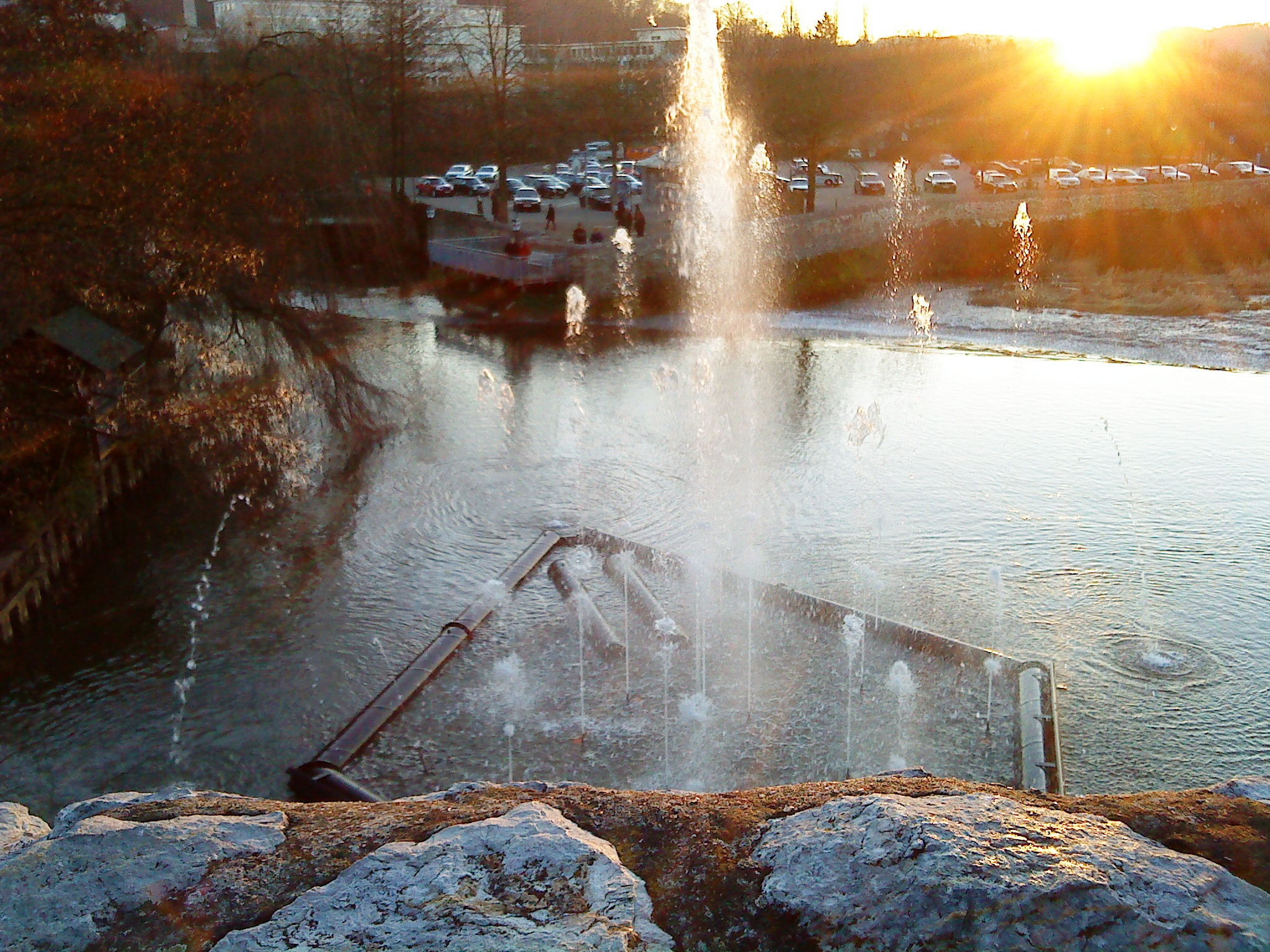 Lichtorgel des Optikparcours in der Lahn bei Wetzlar